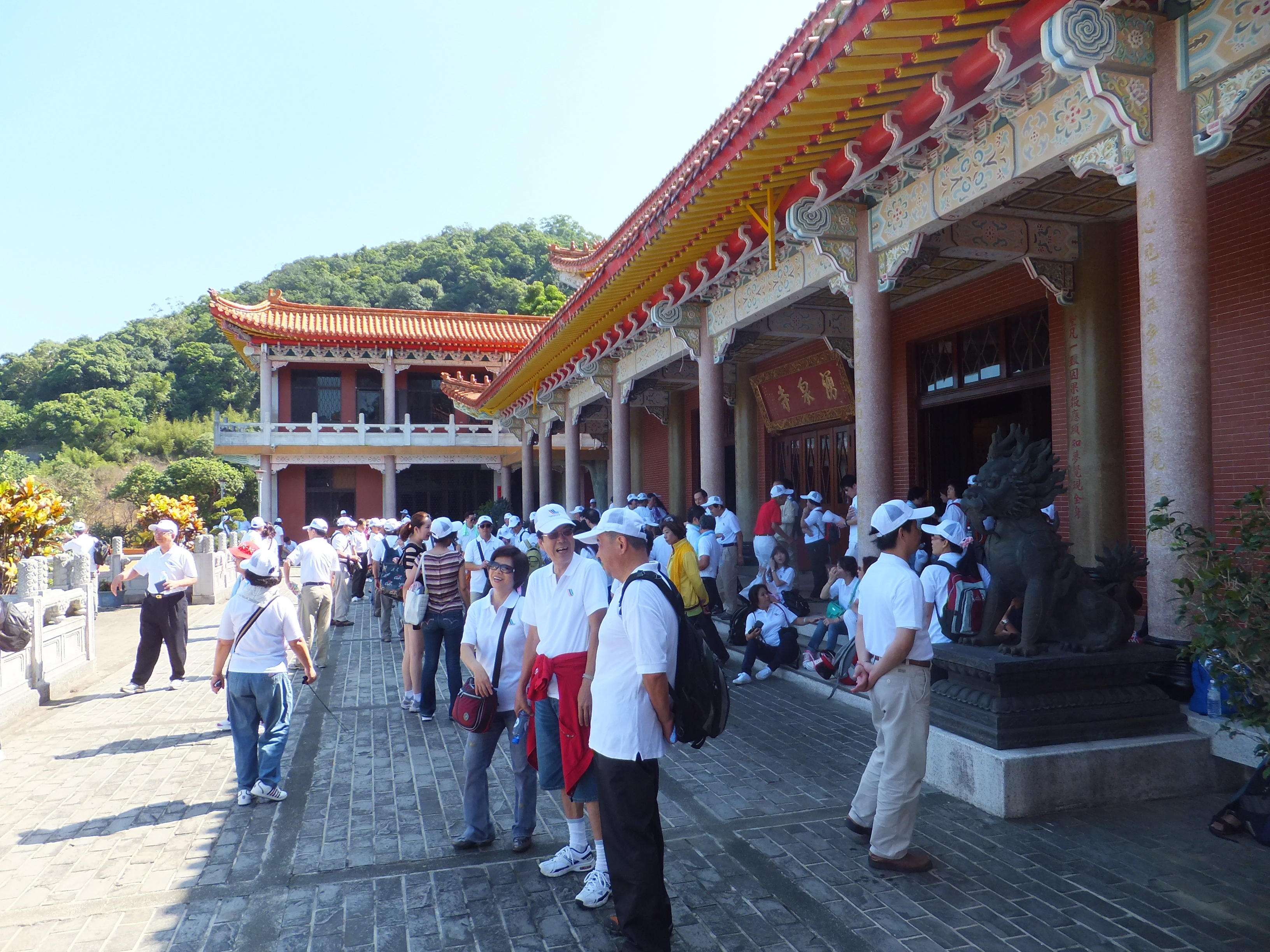 鼓山湧泉寺正殿前亭欣賞風景閒聊的獅子會員。